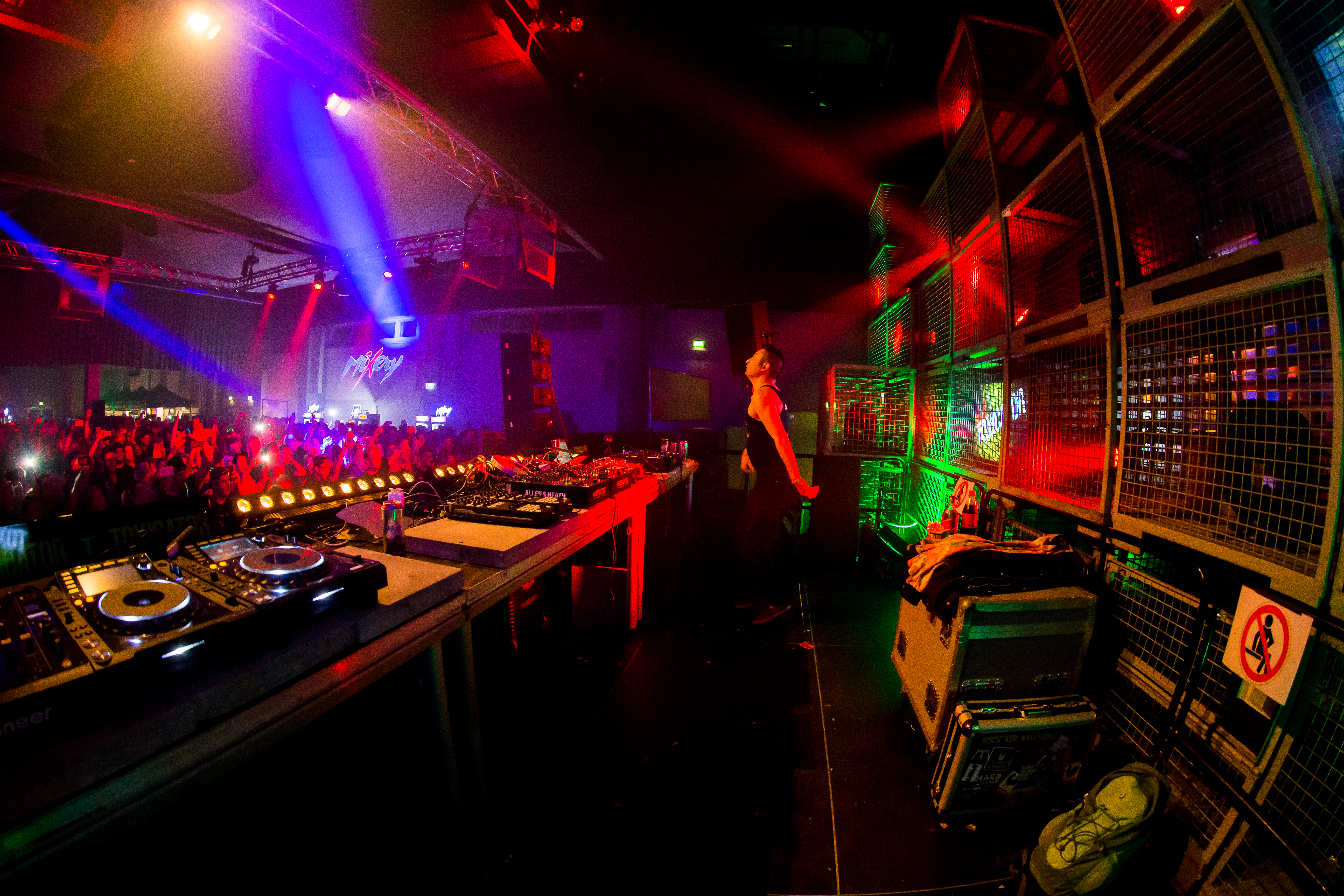 during Toxicator at Maimarkt Halle, Mannheim, Baden Württemberg, Germany on 2015-12-05, Photo: Sven Mandel